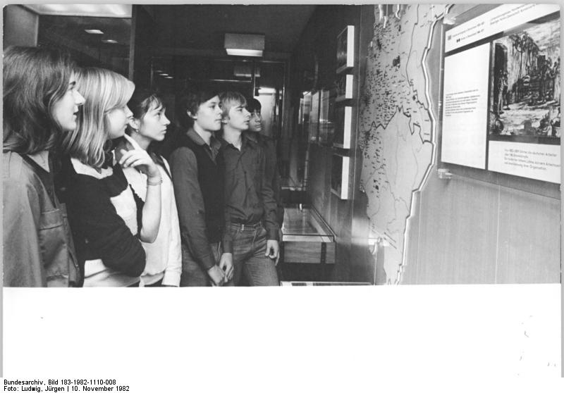 Eisenach, Jugendstunde in der Gedenkstätte Eisenacher Parteitag ADN-ZB Ludwig-10.11.82 Bez. Erfurt: Gedenkstätte der Arbeiterklasse. Wie andere Schüler,d ie sich auf die Jugendweihe vorbereiten, besichtigten auch diese Jungen und Mädchen der Erfurter POS Pablo Neruda die Gedenkstätte Eisenacher Parteitag. An einer Karte informieren sie sich über die Lage der deutschen Arbeiterklasse im Jahre 1869. In jenem Jahr trat in Eisenach im Gasthof Goldener Löwe - der heutigen Gedenkstätte - unter dem Vorsitz von August Bebel, Wilhelm Liebknecht und Wilhelm Bracke der Allgemeine Deutsche Arbeiterkongreß zusammen. Die Sozialdemokratische Arbeiterpartei wurde gegründet.